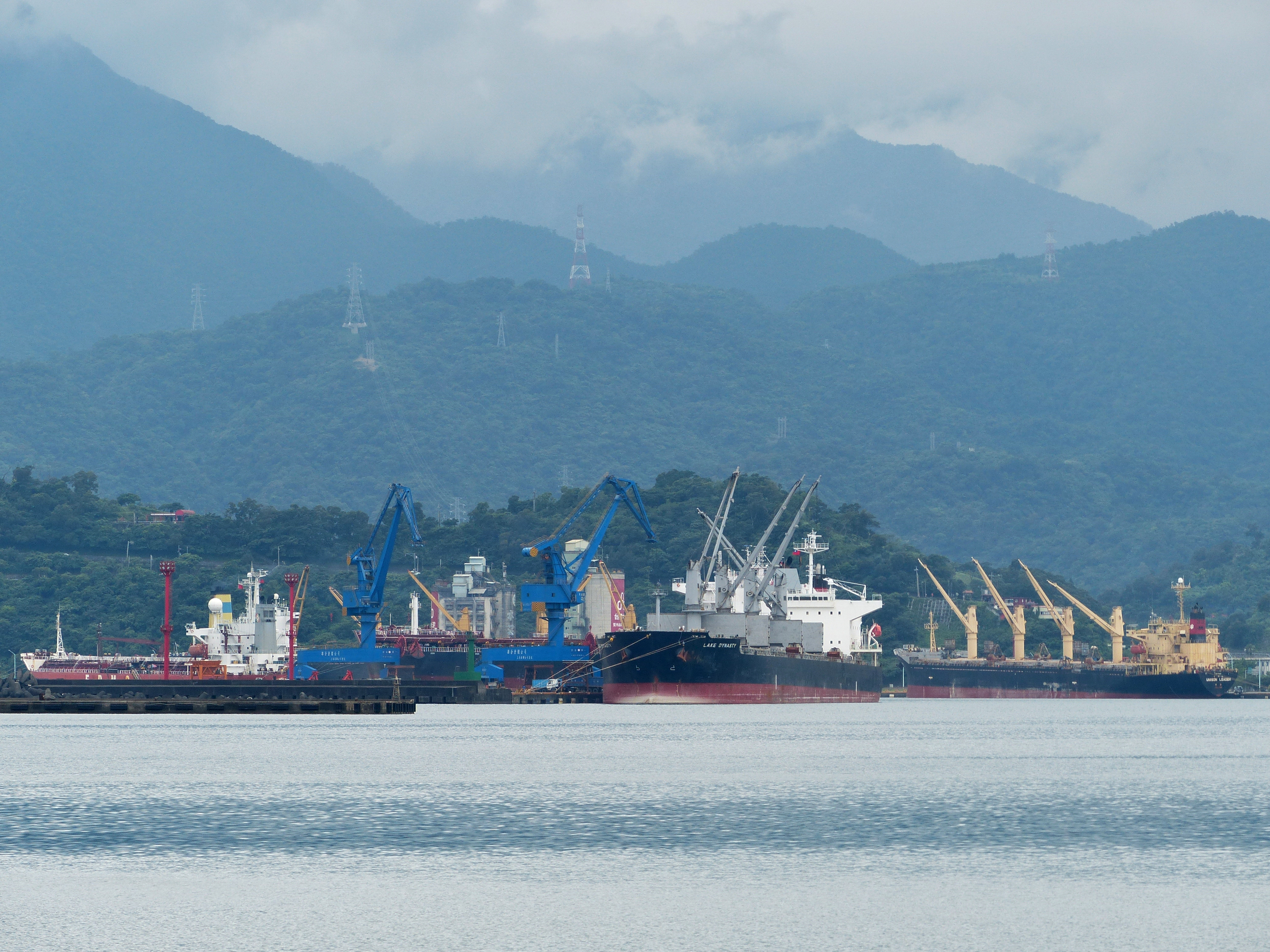 停泊於蘇澳港的荷蘭阿姆斯特丹TRITON NAVIGATION巴拿馬籍散裝貨輪Lake Dynasty（31251總噸），後方是友聖航運（Unison Marine Corp.）中華民國籍散裝貨輪聖暉輪（20947總噸）。